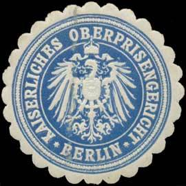 Sealing stamp Title: Kaiserliches Oberprisengericht Description: blau, weiß, geprägt Place: Berlin size: 4 cm